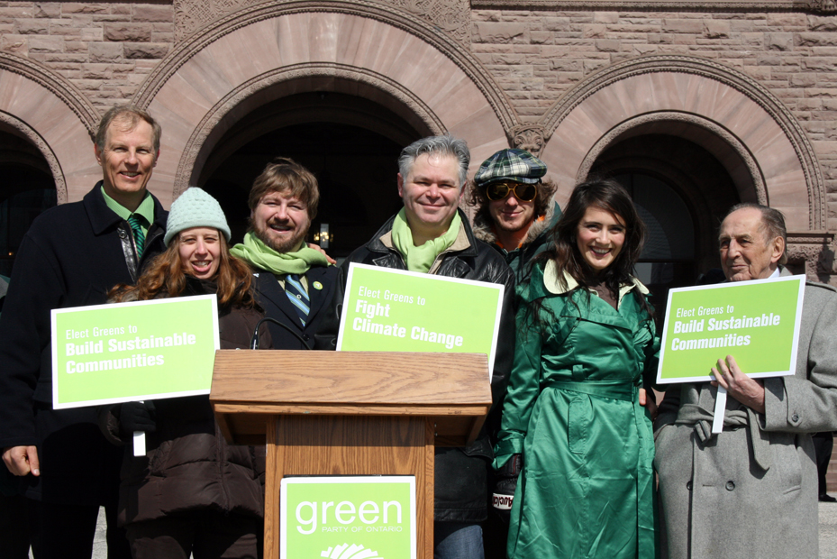 Greens at Queen's Park